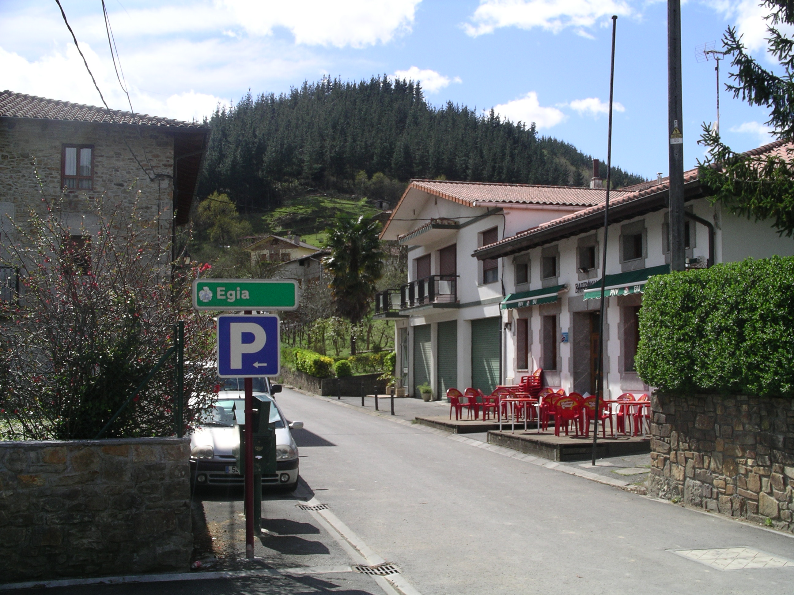 Zeberioko Egia Auzoa.